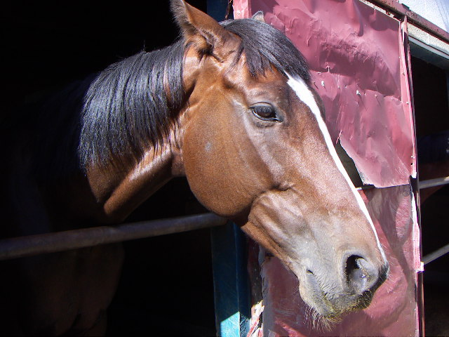 エイシンチャンプ